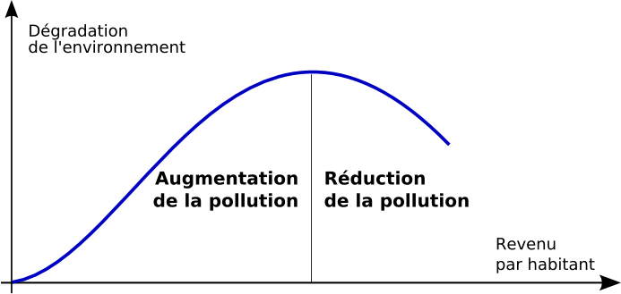 Courbe environnementale de Kuznets. Attention, cette courbe n'est pas due à cet économiste. La vraie courbe de Kuznets est similaire mais met en rapport inégalités et croissance économique.